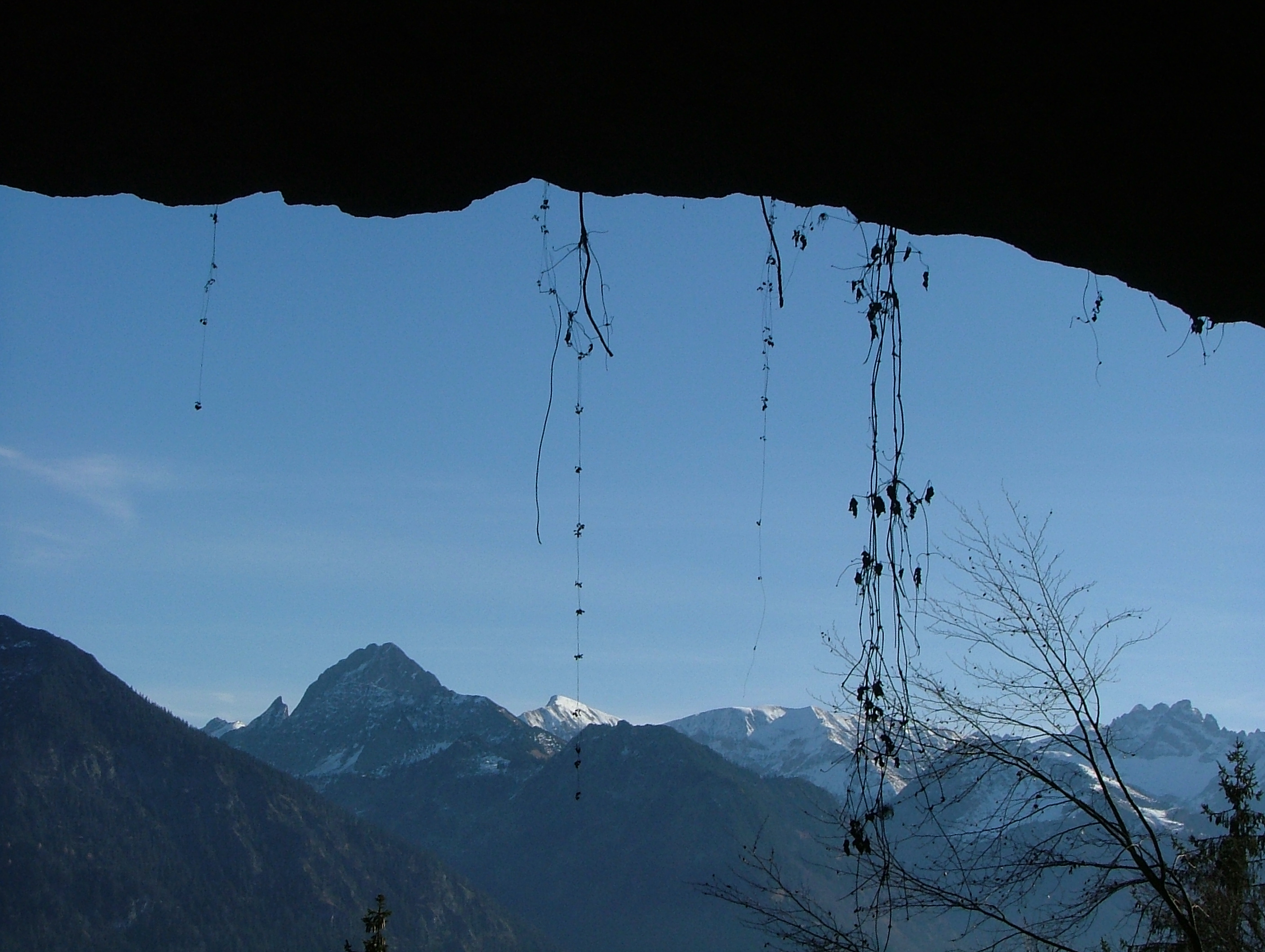 Höhle